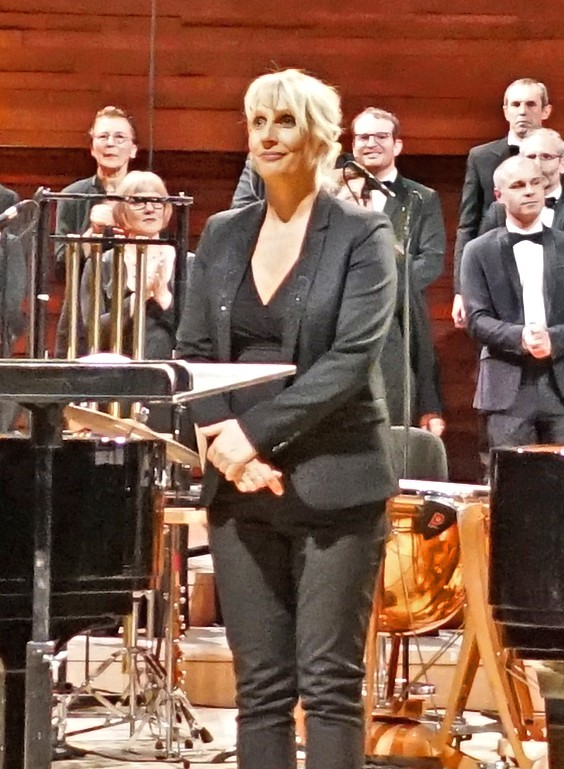 Salut final du concert de clôture du week-end choral autour des 70 ans du Chœur de Radio France dirigé par Sofi Jeannin